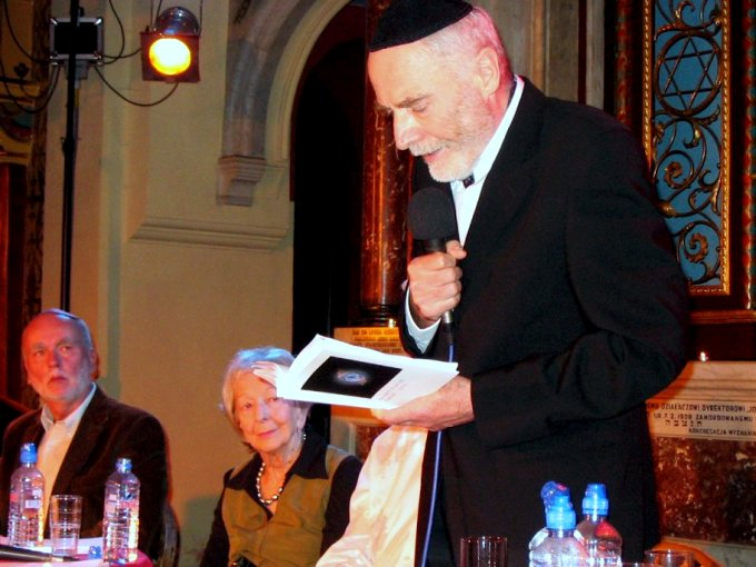 Ryszard Krynicki, Polish poet and editor